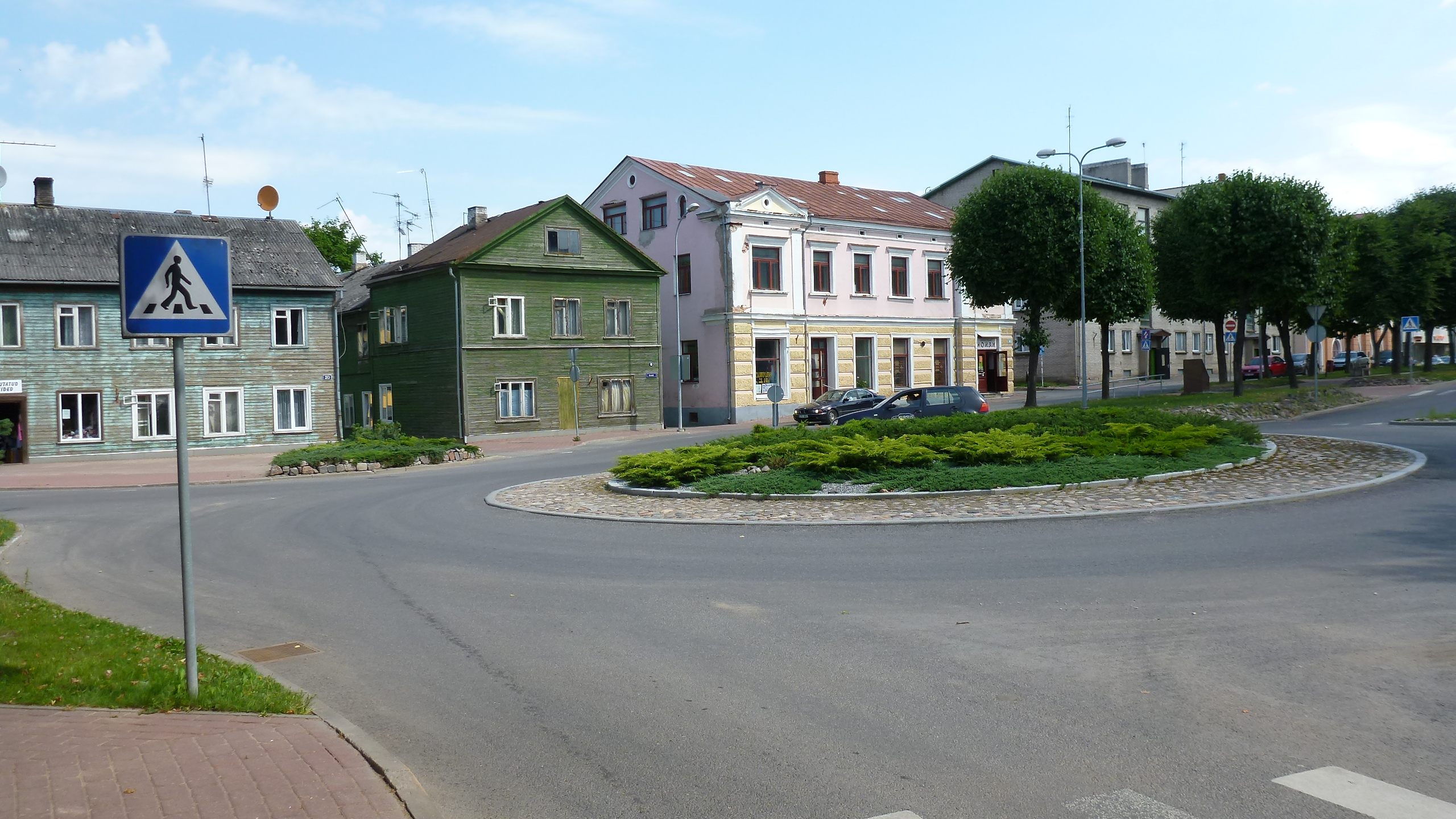 Liikenneympyrä Valgassa